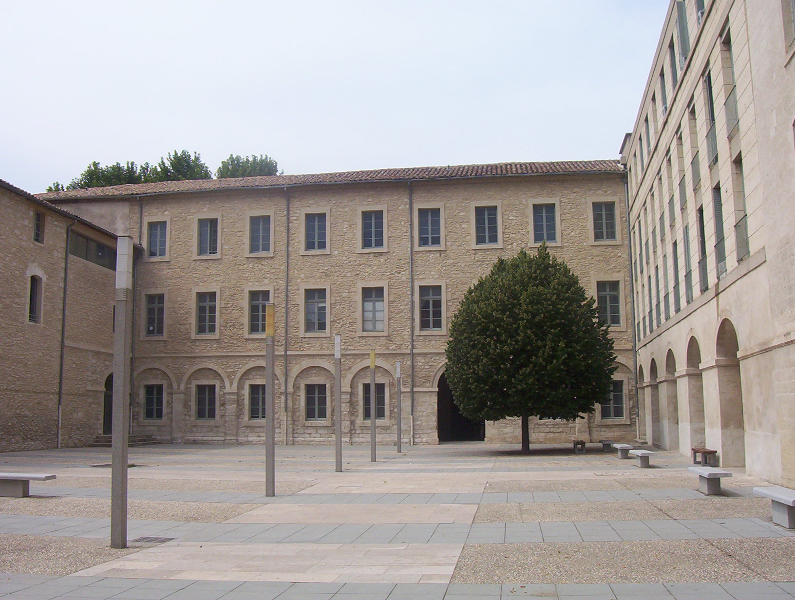 Université d'Avignon et des Pays de Vaucluse, France : Site Sainte-Marthe, cour intérieure.